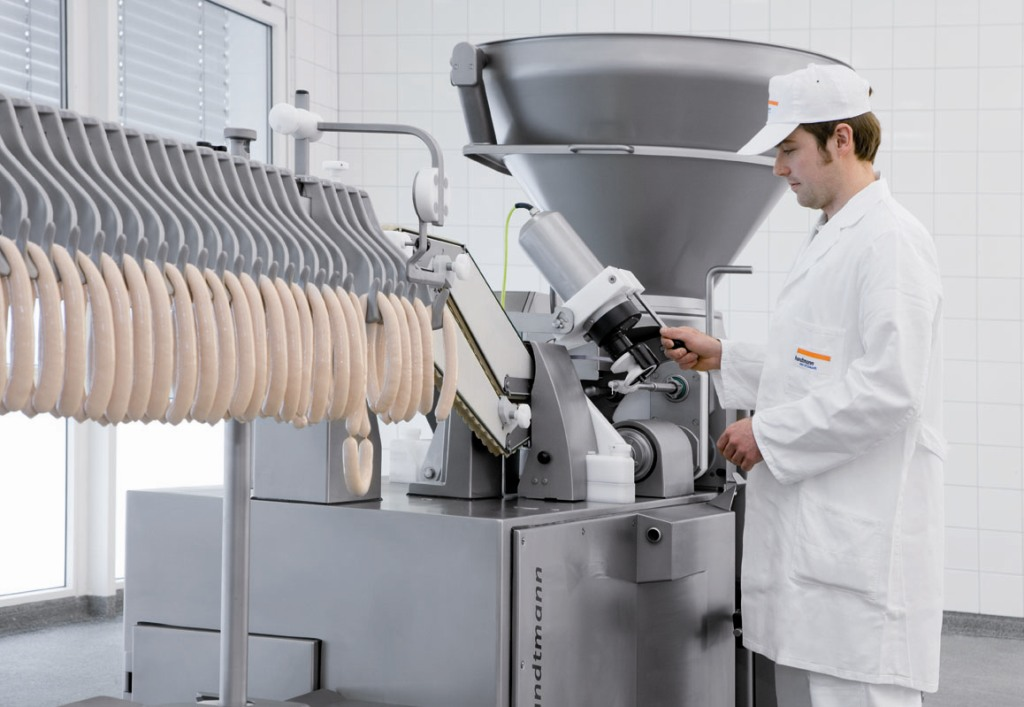 Vorführung zur Funktionsweise eines AL-Systems